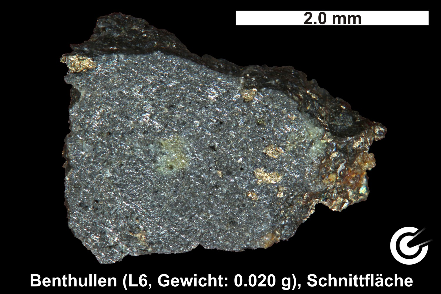 Detailansicht eines Fragmentes aus dem dunklen Bereich vom Meteorit Benthullen